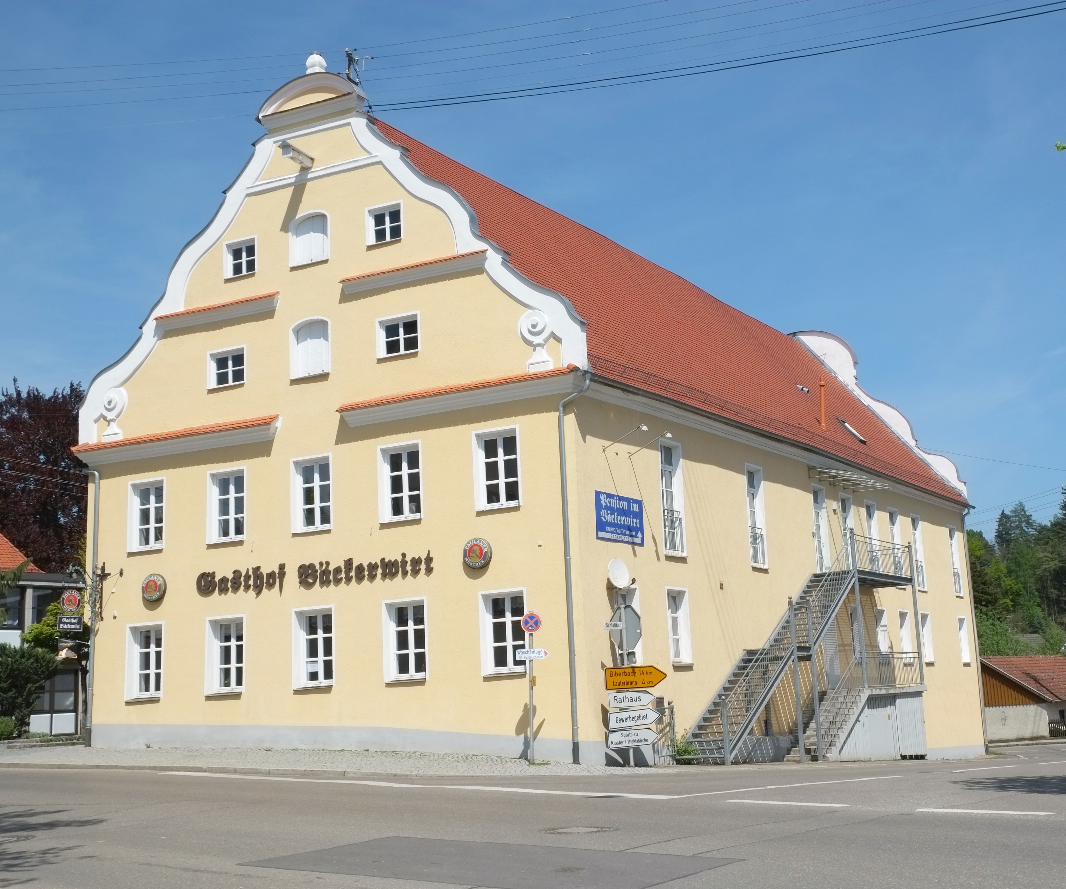 Gasthaus Bäckerwirt in Welden im Landkreis Augsburg (Bayern, Deutschland)